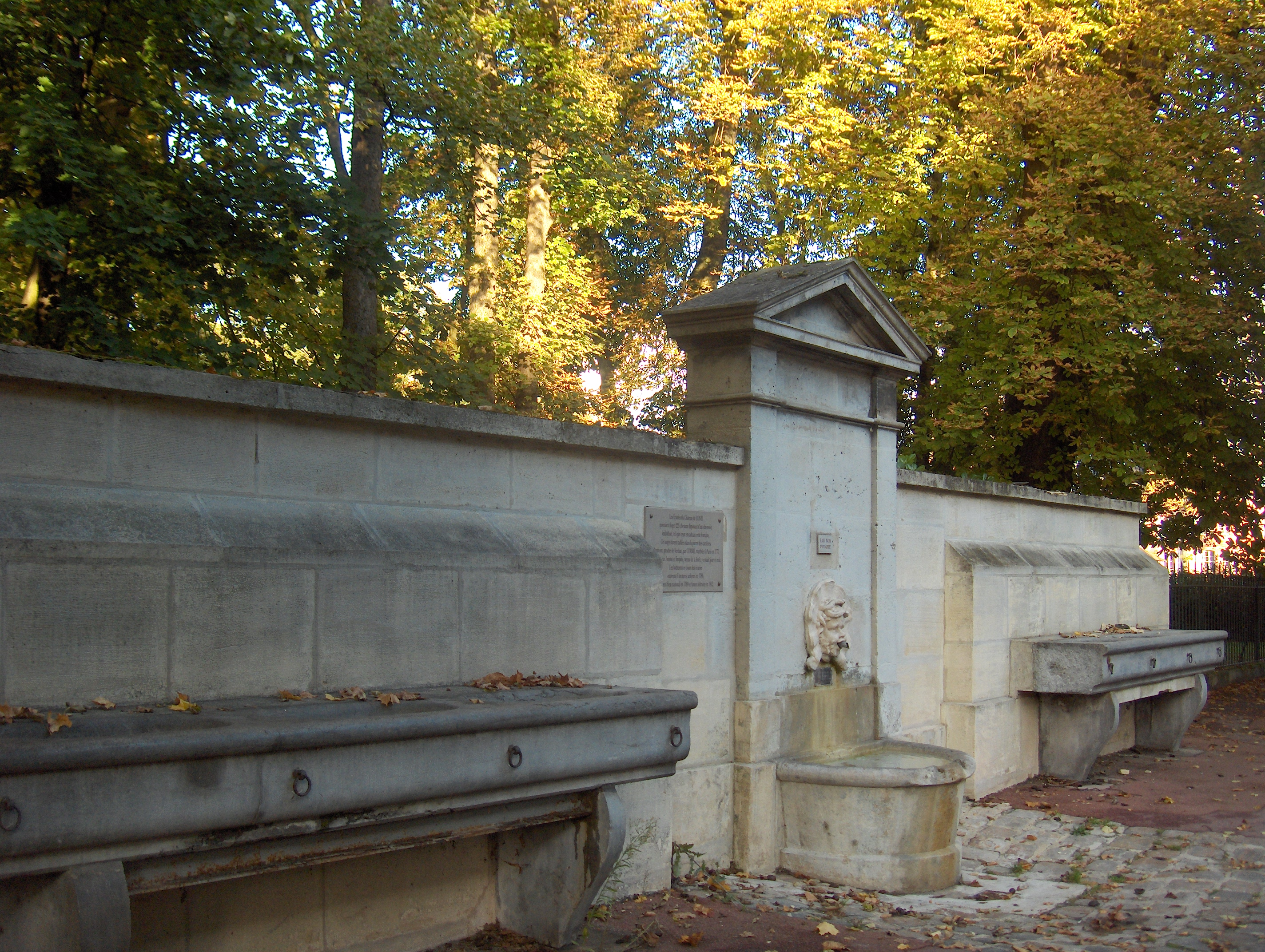 Abreuvoirs des écuries monumentales du château des princes de Conti à L'Isle-Adam, reconvertis en fontaine publique, et qui furent taillés dans la pierre de Jaumont par le marbrier Corbel de Paris en 1777.